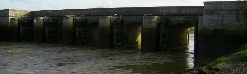 Portes des veys sur le fleuve La Vire